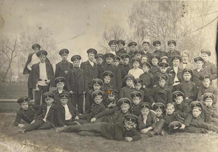 Студенты Московского старообрядческого института с преподавателем Александром Васильевичем Зайцевым (третий справа, в светлом пиджаке)